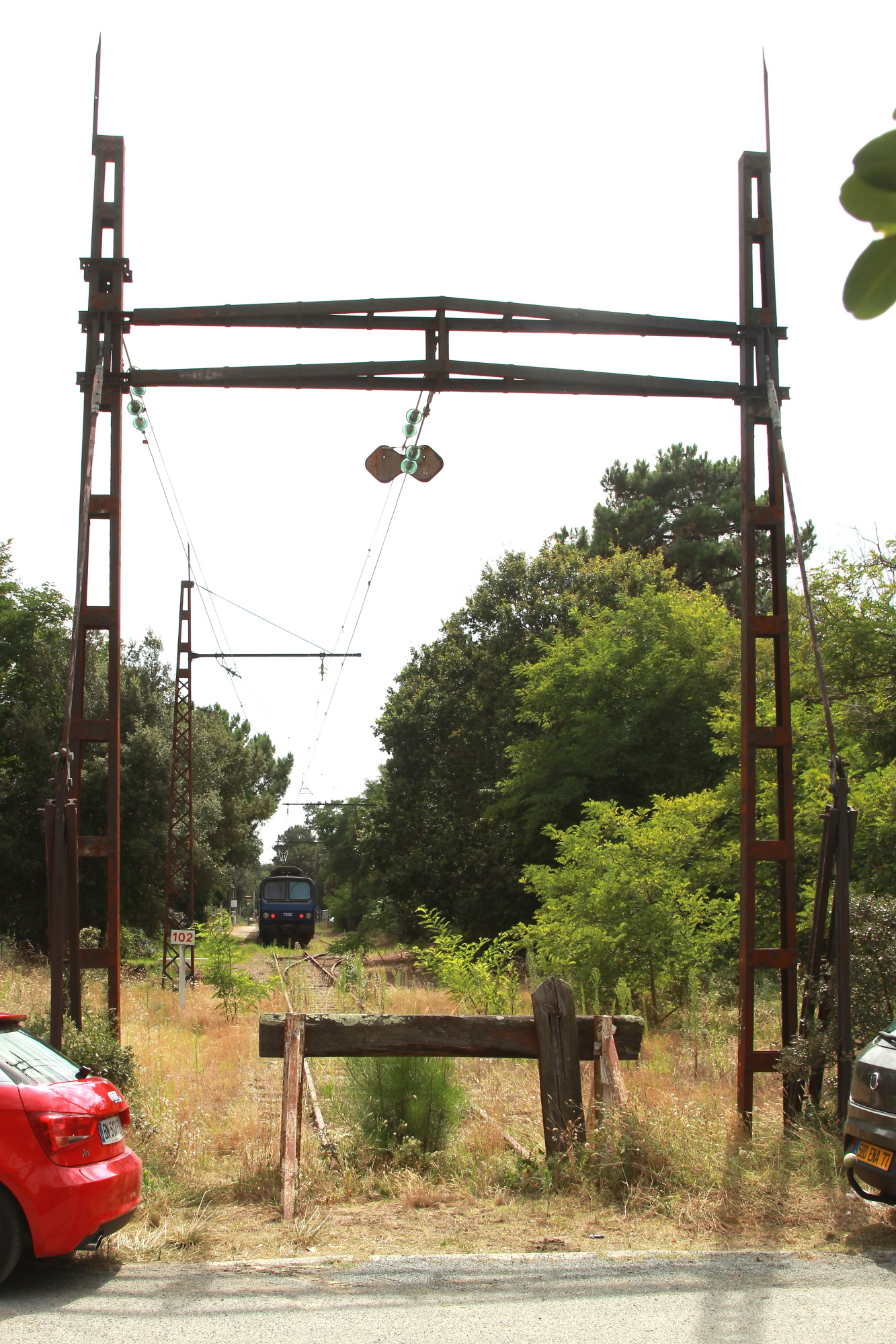 Le buttoir de la ligne de Ravezies à Pointe de Grave, à la Pointe de Grave. La Z7302 est en arrière plan.